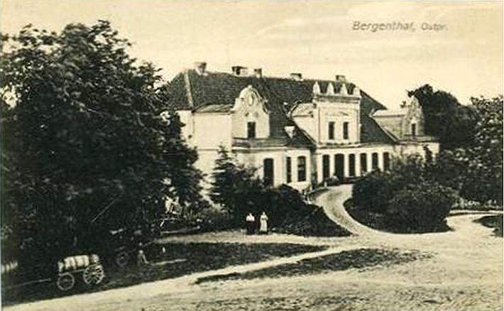 Postkarte von Bergenthal (Ostpreußen), 1910 gelaufen